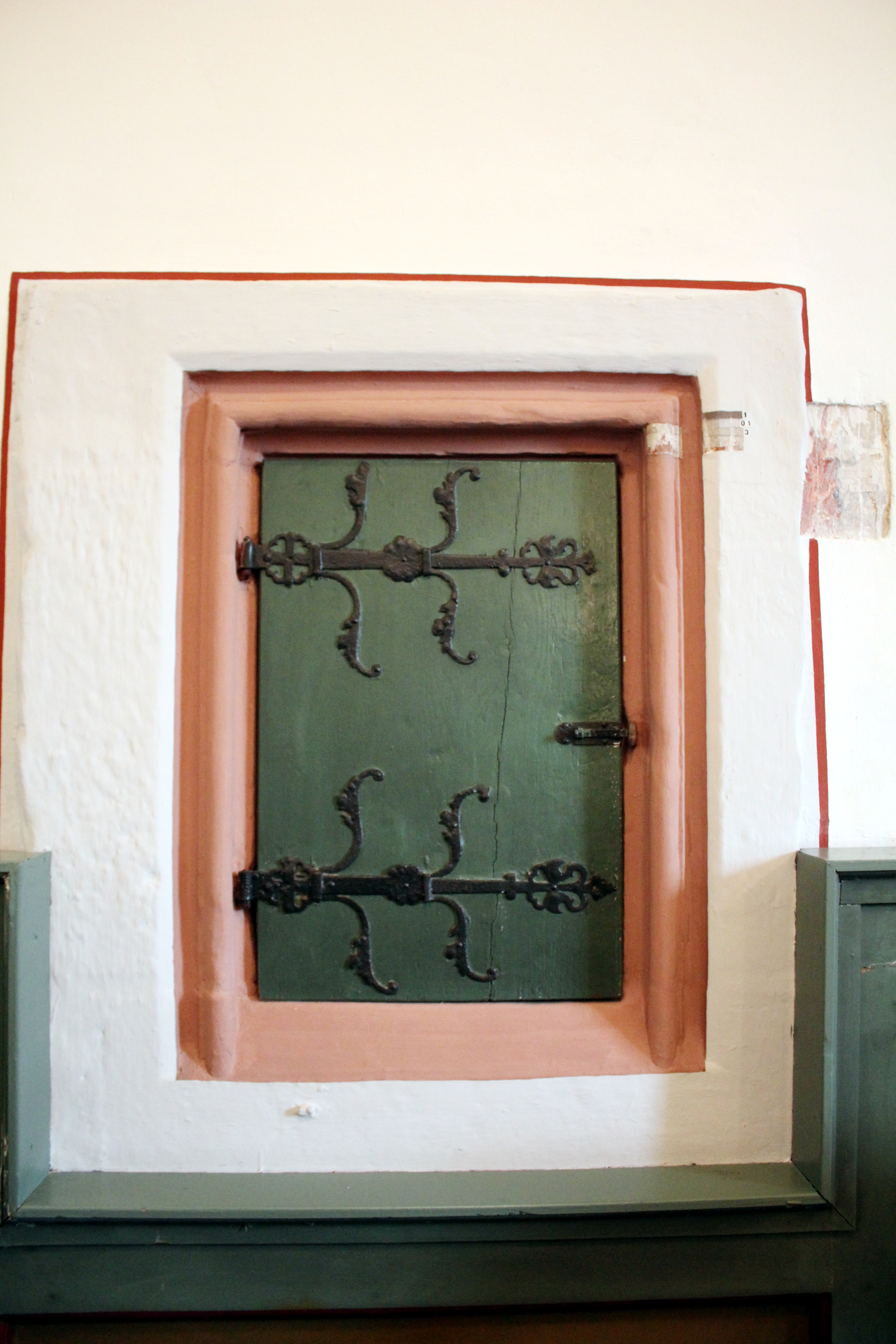 Evangelische Kirche Wolfshausen, Weimar/Lahn, Landkreis Marburg-Biedenkopf, Hessen, Deutschland